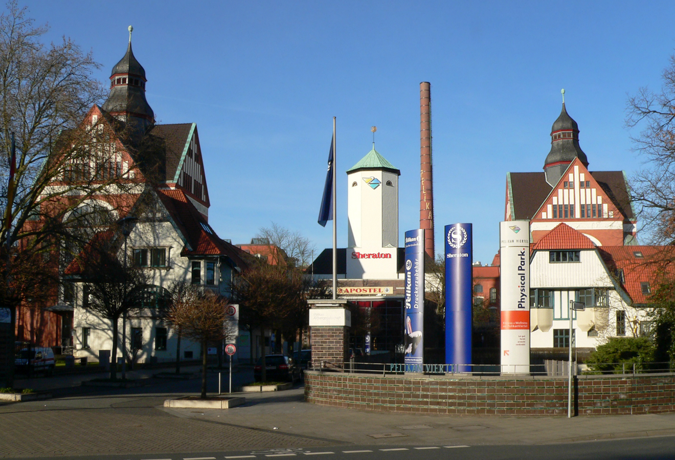 Pelikanviertel